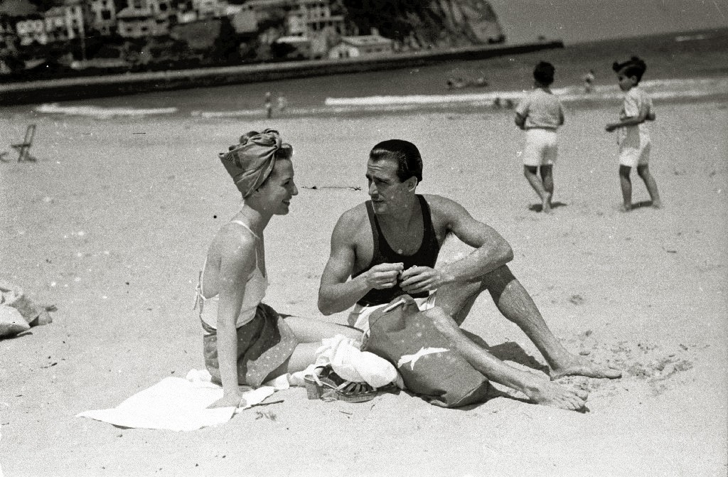 Título original: Los actores Luchi Soto y Luis Peña en la playa de Ondarreta (1/4) Localización: San Sebastián (Guipúzcoa)